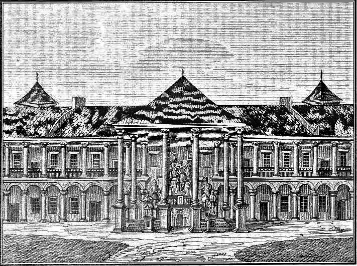 Portyk w zamku w Żółkwi, 1847